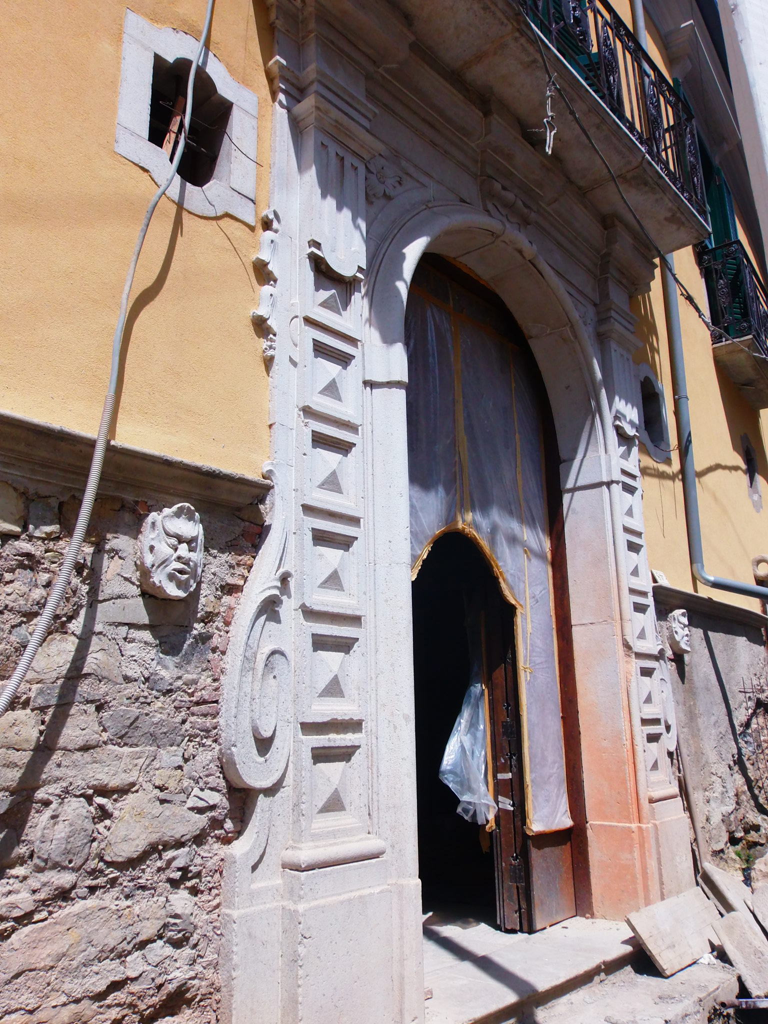 Ingresso Portale Ciasca, Pignola.